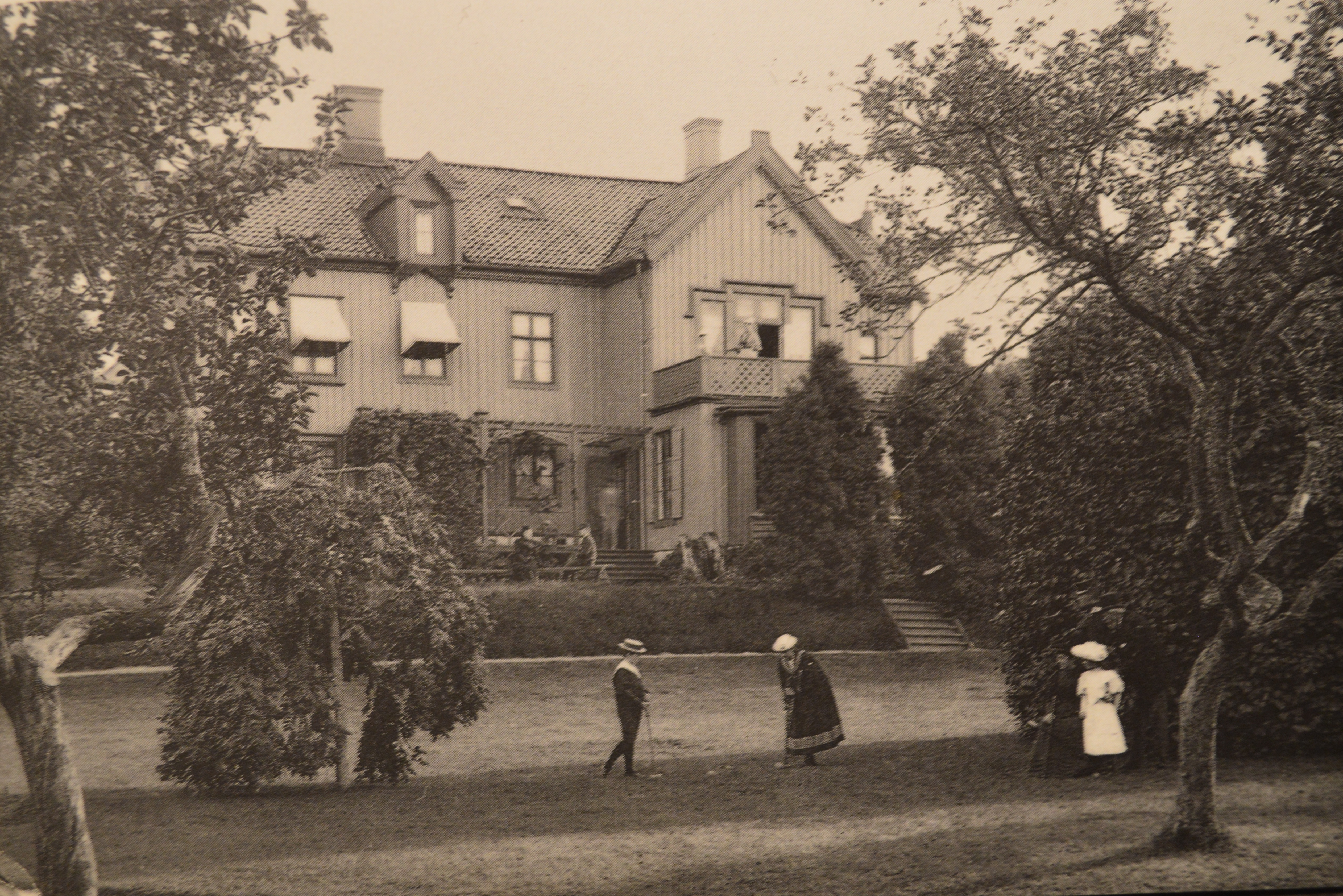 Lilla Torps huvudbyggnad med trädgård, foto taget senare 1800-tal